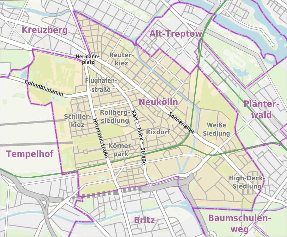 Übersichtskarte der Straßen und Ortslagen in Berlin-Neukölln